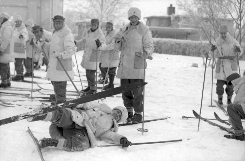 Finsk-Ryska kriget 1939-1940. Danska frivilliga lära sig åka skidor. Finland, januari 1940.Se 10/1940.